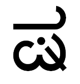 шакараву